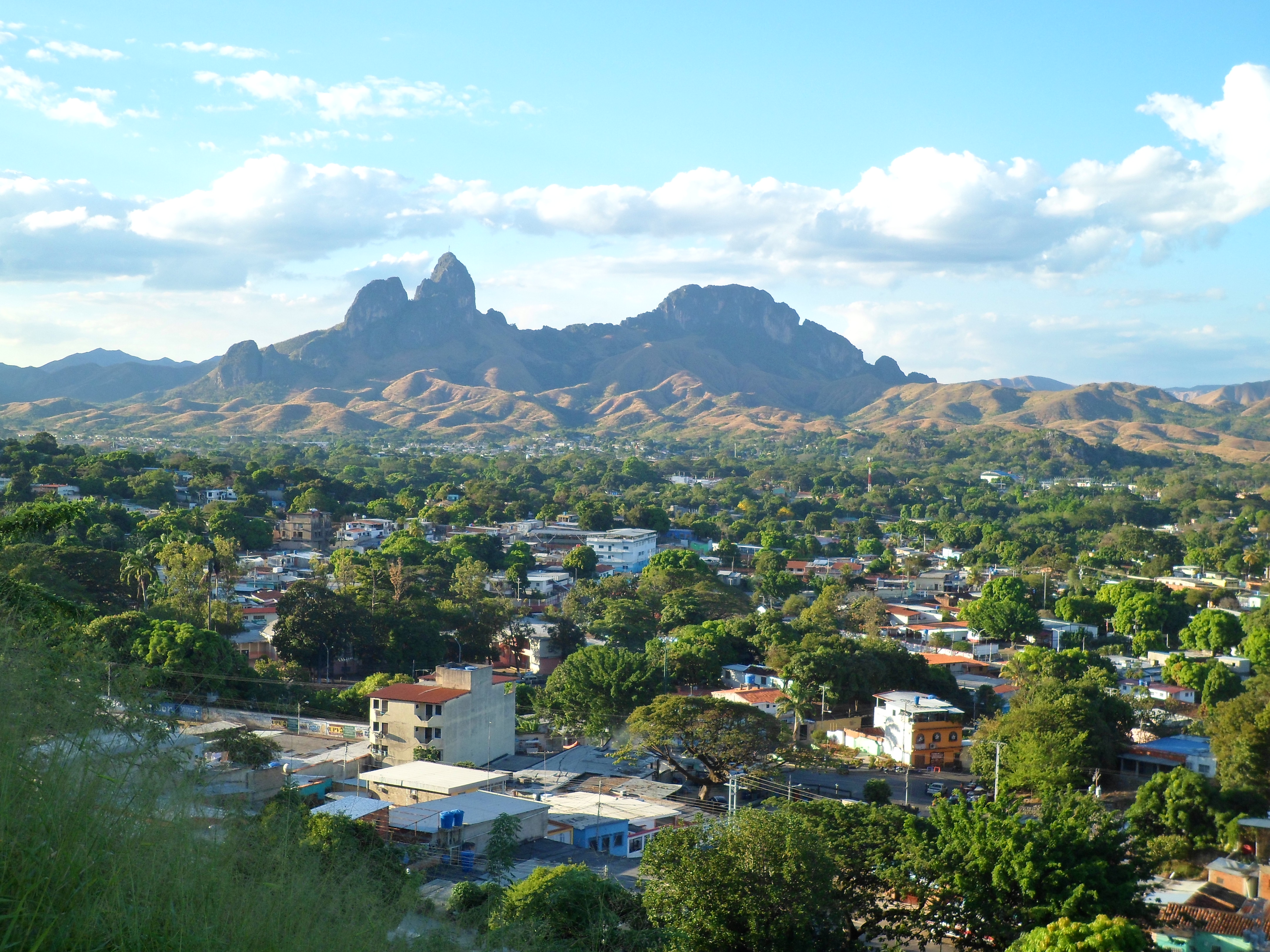 CIELO, MORROS, Y SENDEROS.